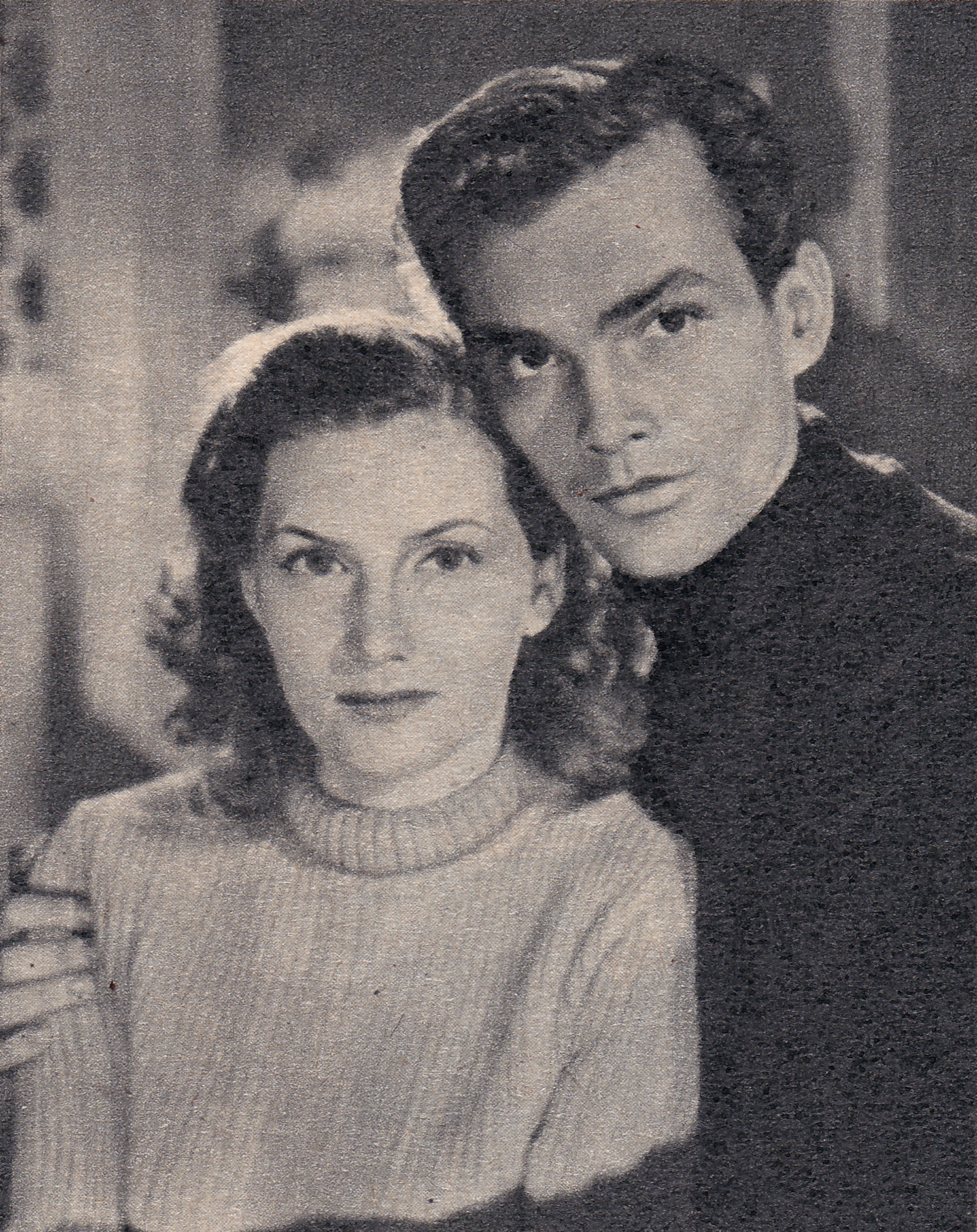 Barbro Kollberg och Birger Malmsten i "Det regnar på vår kärlek".